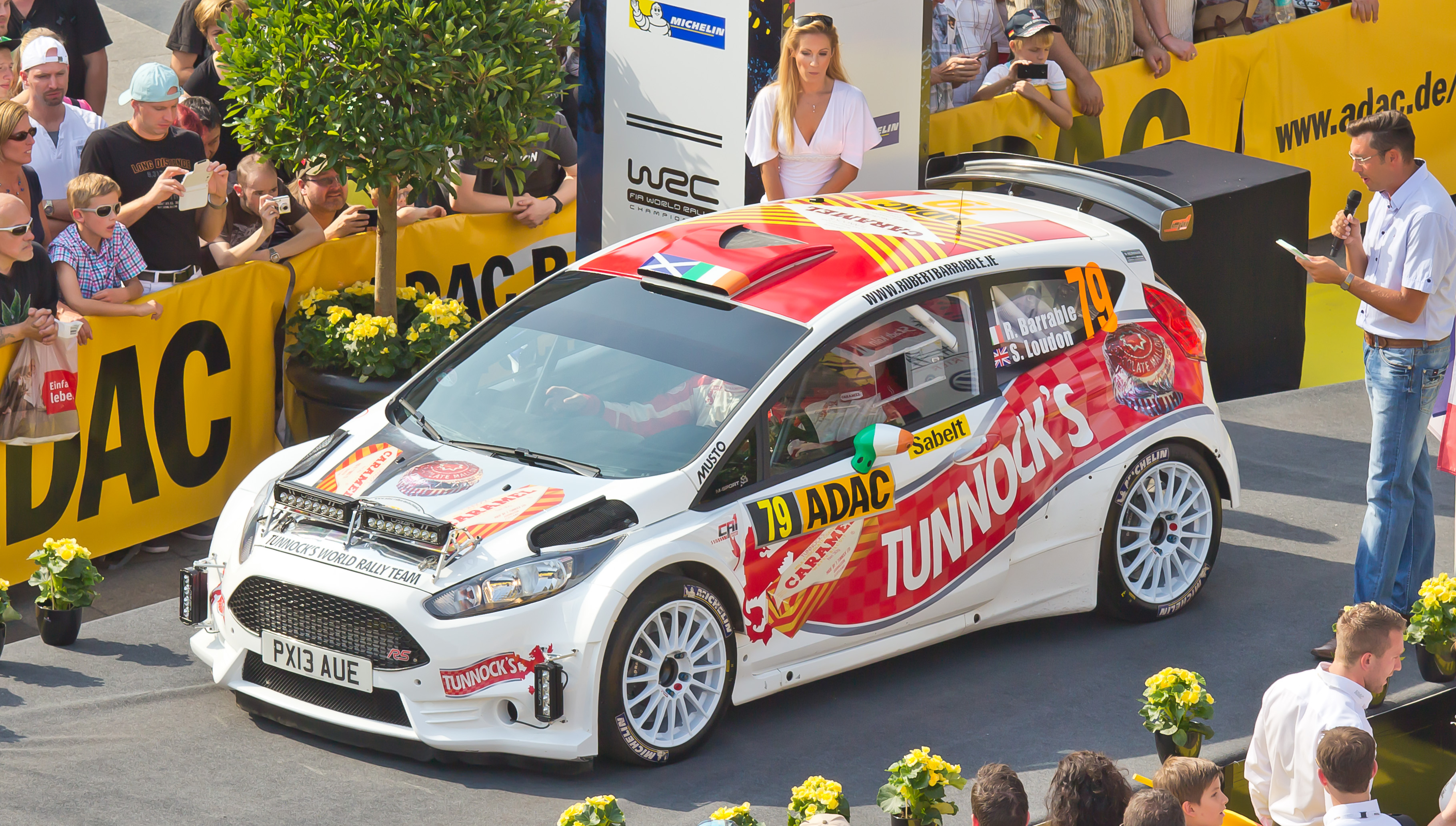 ADAC Rallye Deutschland 2013 - Fahrerpräsentation auf dem Roncalliplatz: Tunnock’s World Rally Team mit dem Fahrer Robert Barrable und und Co-Fahreri Stuart Loudon im Ford Fiesta R5